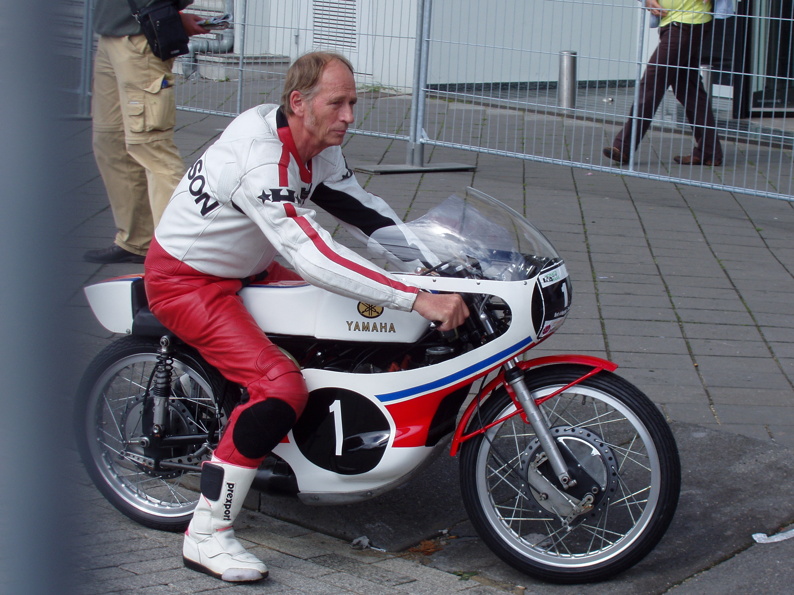 Kent Andersson, gemaakt door GM